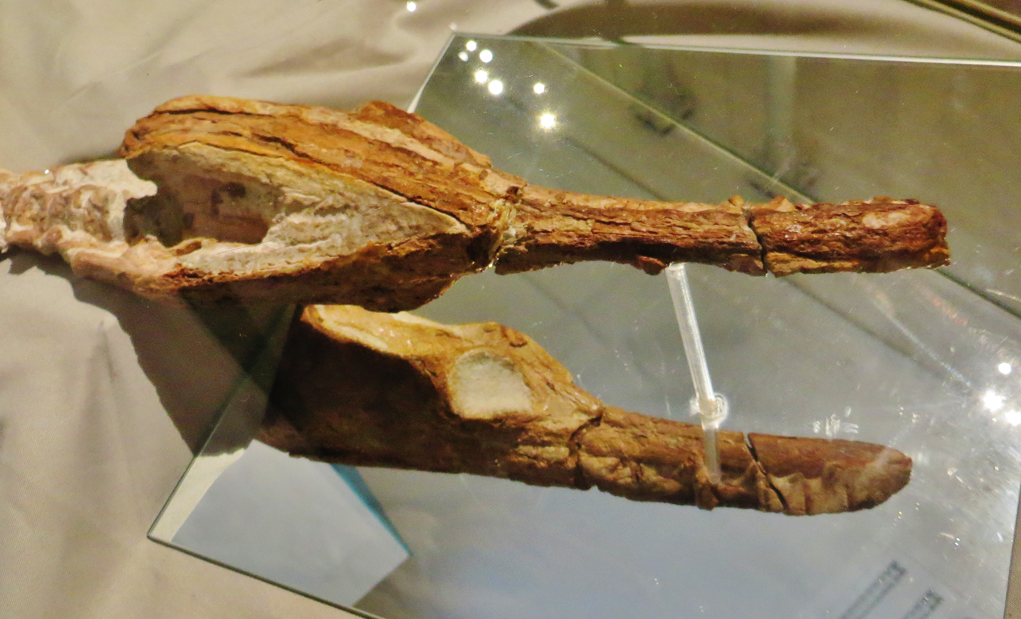 Fossil - Took the picture at Museum of Natural History, Karlsruhe